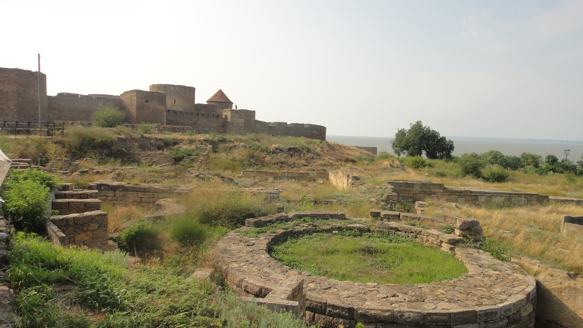 Один из видов Белгород-Днестровской крепости (Аккерманской)(Украина)